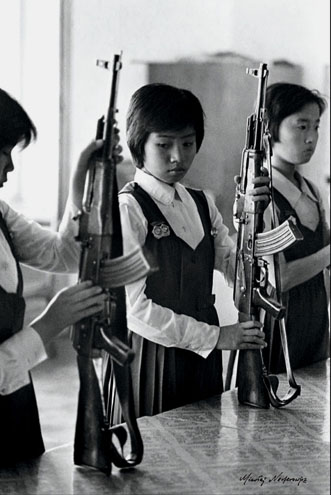 1989, Korea Północna. Lekcja w szkole. Fotografia z cyklu "Kobiety Świata”. Fot. Mikołaj Nesterowicz